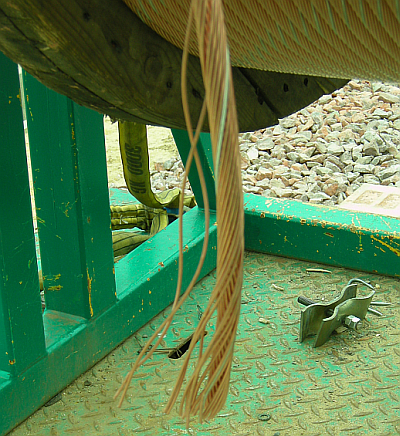 Uiteinde van de koperen draagkabel van de Nederlandse Spoorwegen